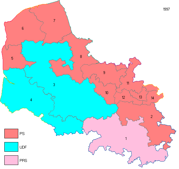 Pas-de-Calais en 1997.